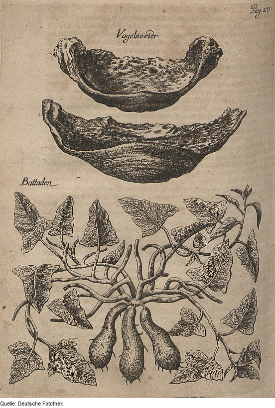 Original image description from the Deutsche Fotothek Pflanzenbau & Spezialkultur